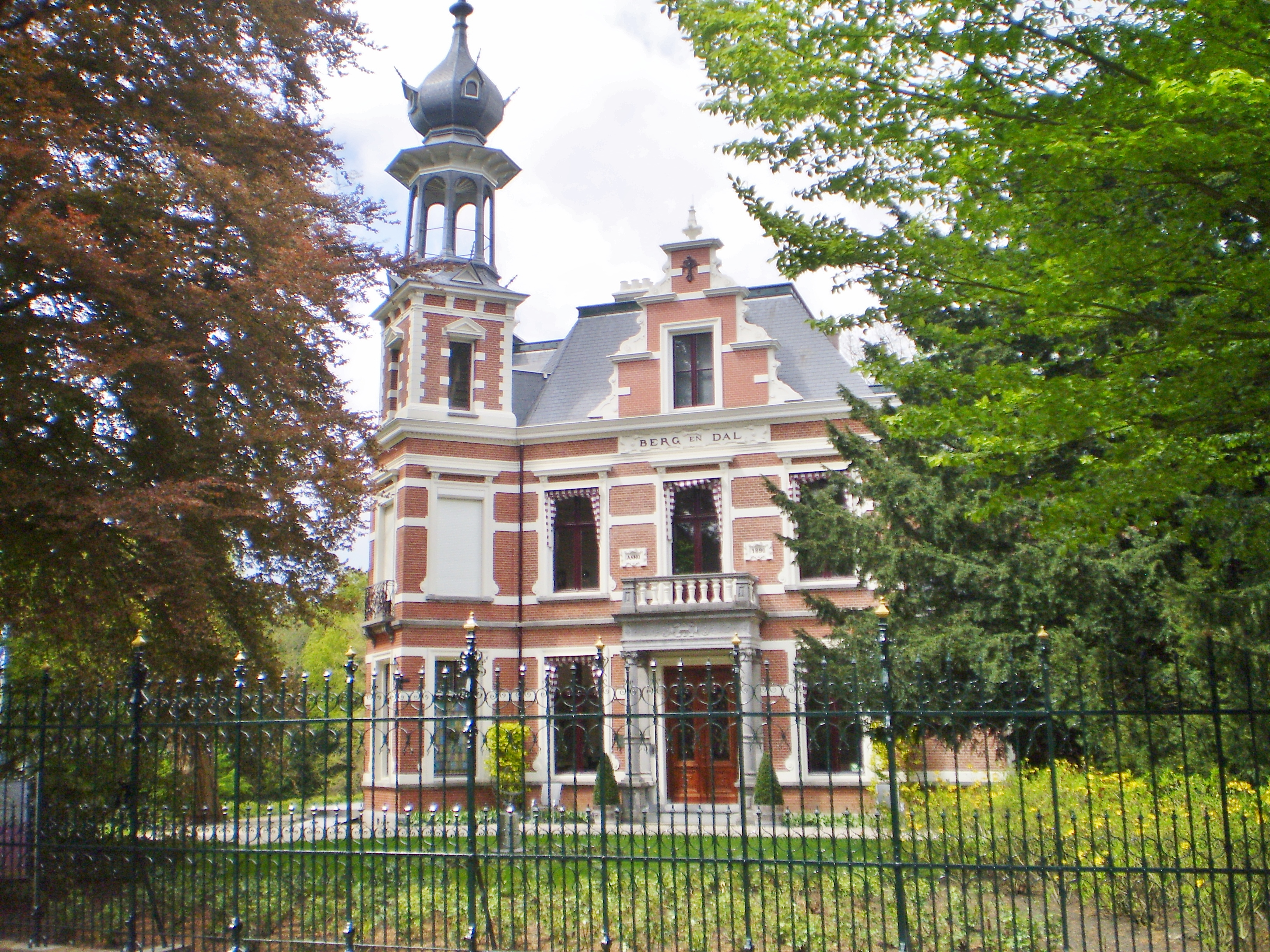 zijde Lenneplaan, opvallend is het torentje